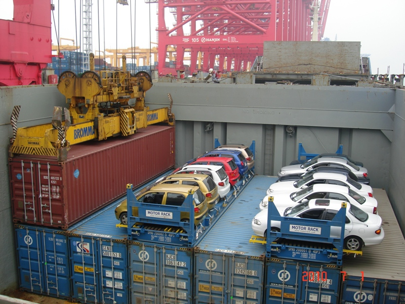 粵語: 公司韓進海運集裝箱航運現場